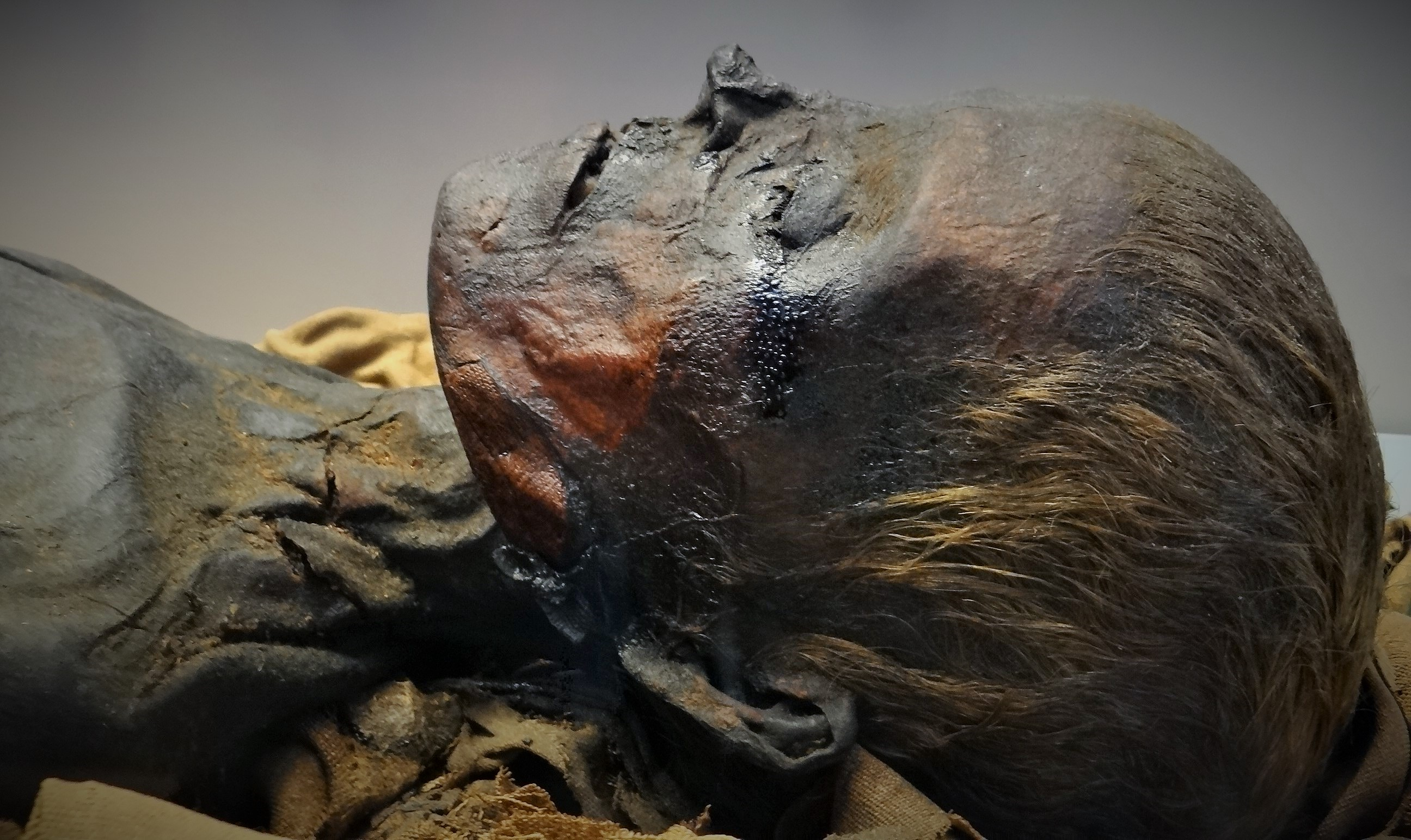 Momie égyptienne au British Museum, Londres